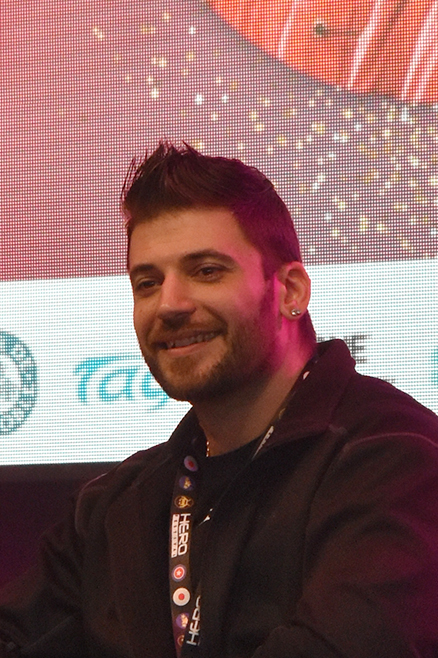 L'acteur Stanislav Ianevski lors du Hero Festival de Grenoble en avril 2019